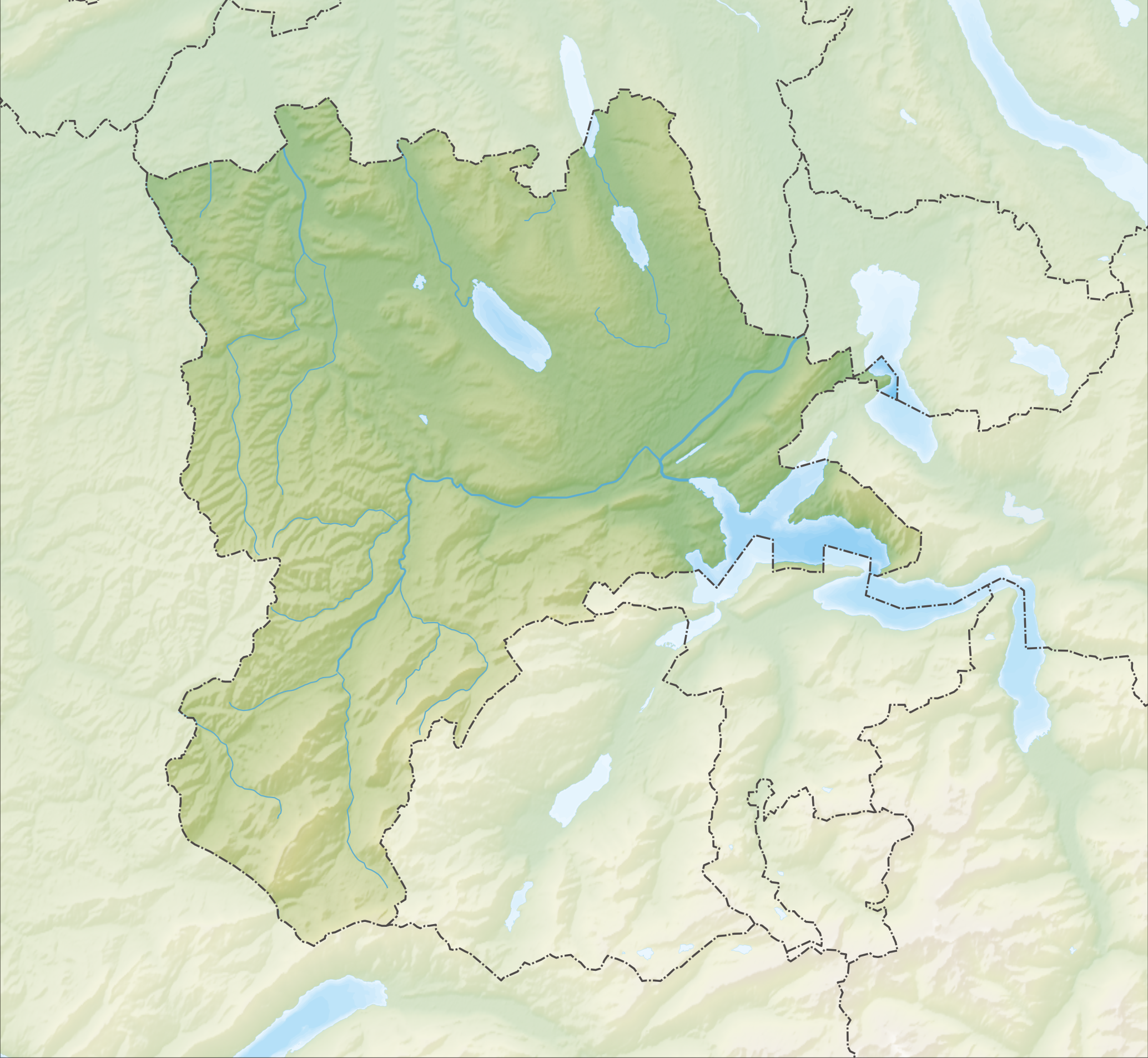 Reliefkarte des Kantons Luzern Topographischer Hintergrund: NASA Shuttle Radar Topography Mission (public domain). SRTM3 v.2.